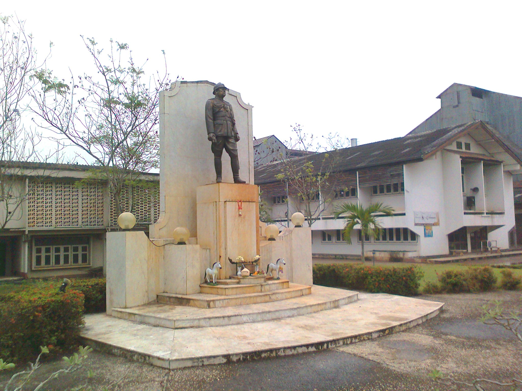 General Phahol Payuhasena Monument